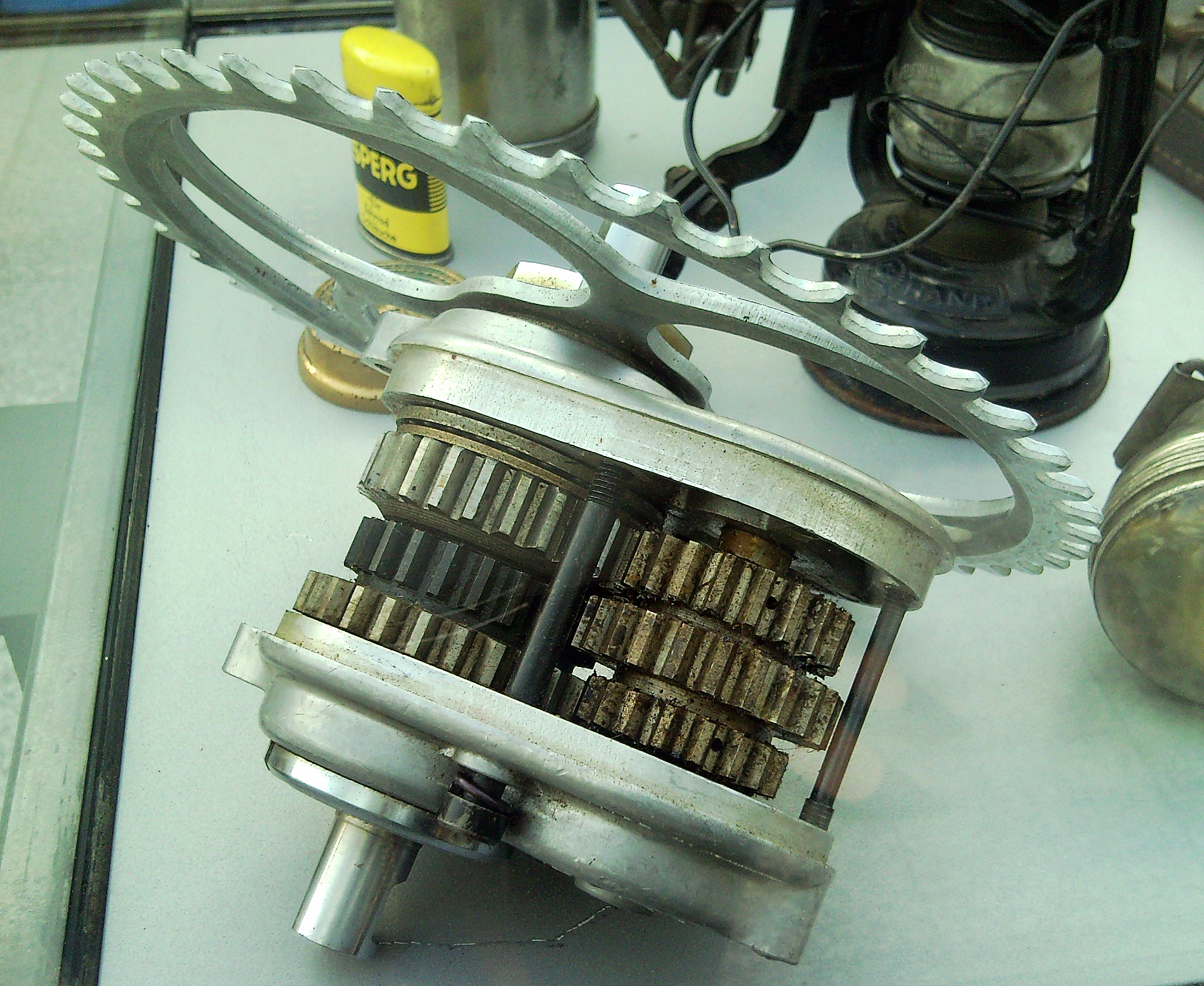 Fahrradgetriebe Mutaped (Fa. Phoebus)